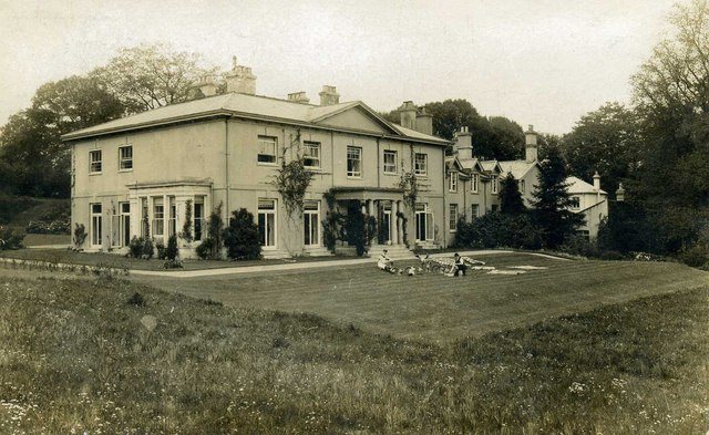 Kesgrave Hall - 1907